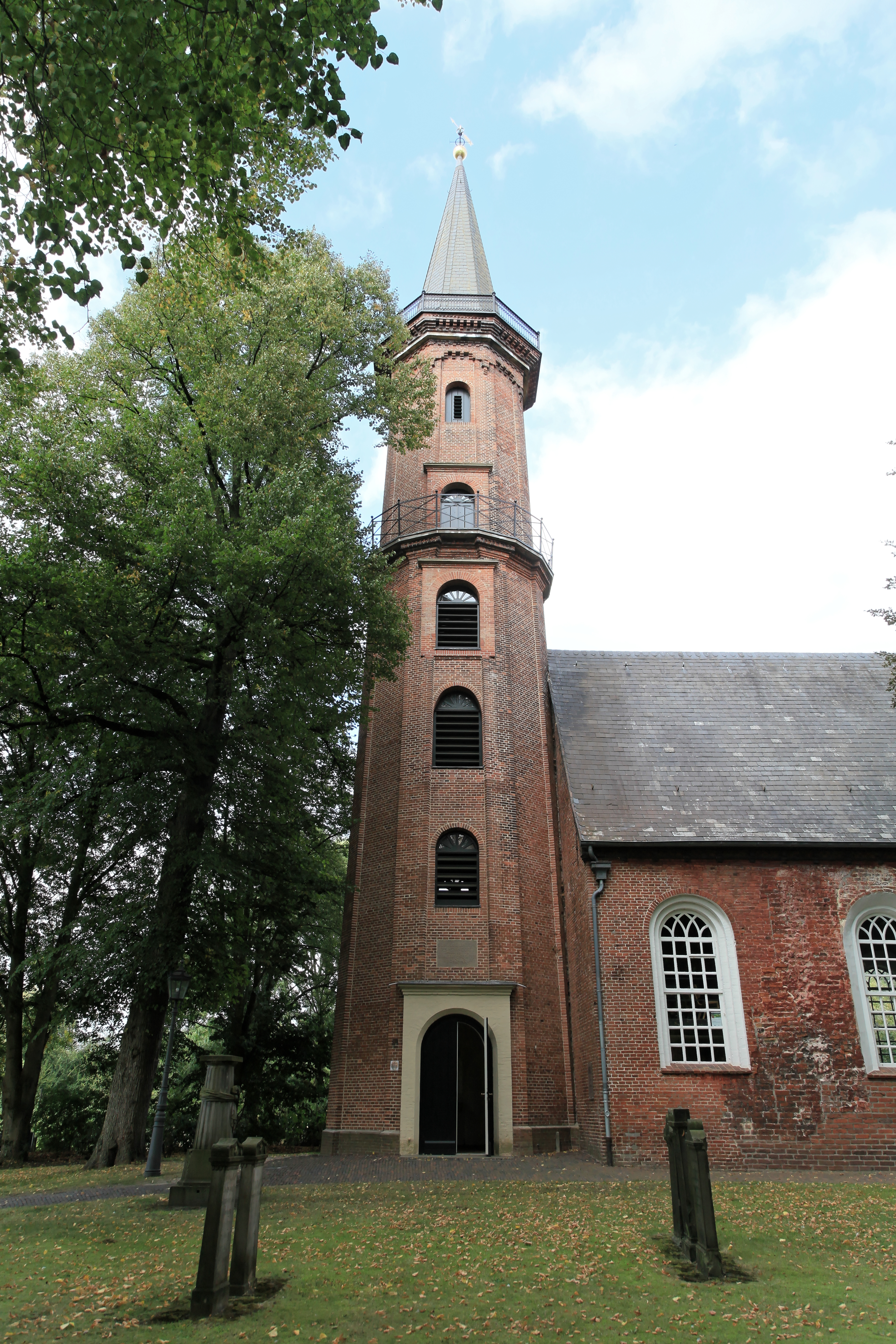 Reformierte Kirche am Reformierten Friedhof, Am Schlosspark in Leer (Ostfriesland)